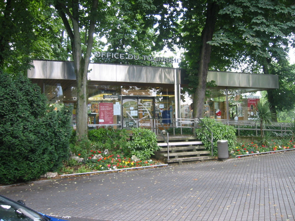 Office du tourisme de Besançon, parc Micaud